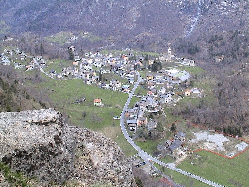 Vista panoramica del capoluogo.